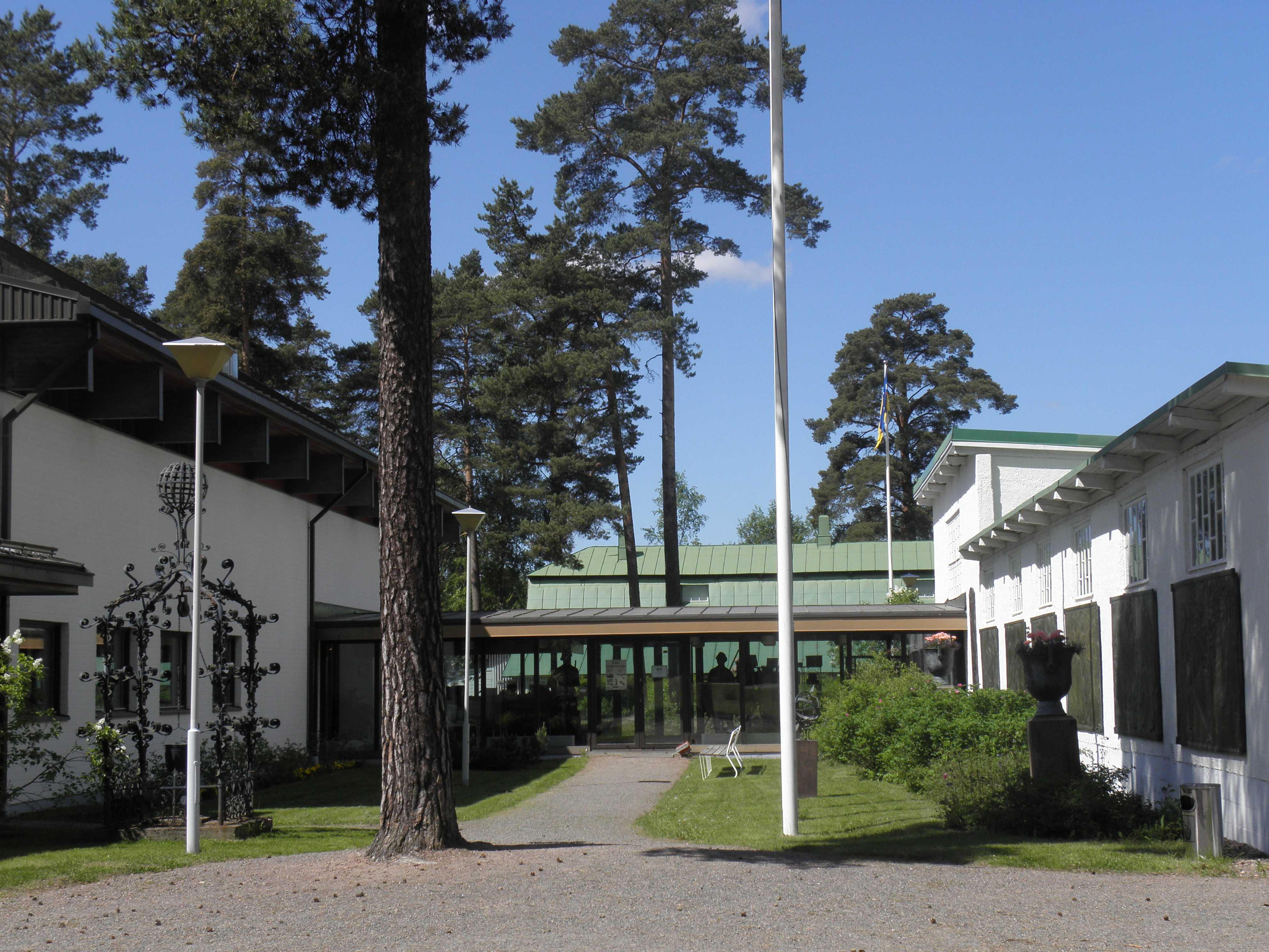 Emil Cedercreutzin museo, Harjavalta